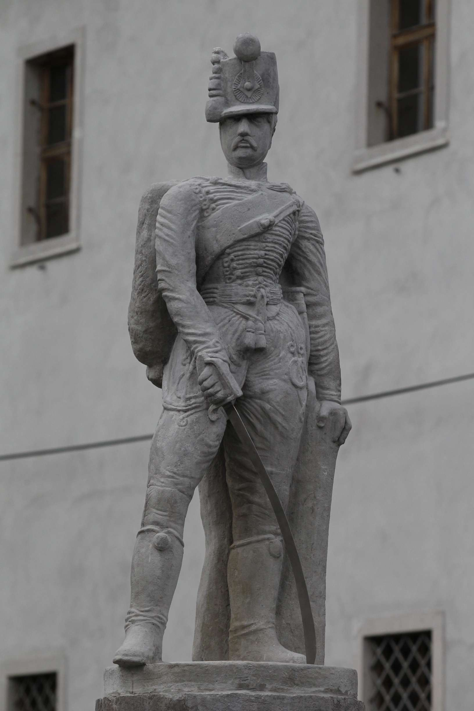 Odkritje obnovljena spomenika madžarskemu huzarju Pálu Rostásu v Budanjah